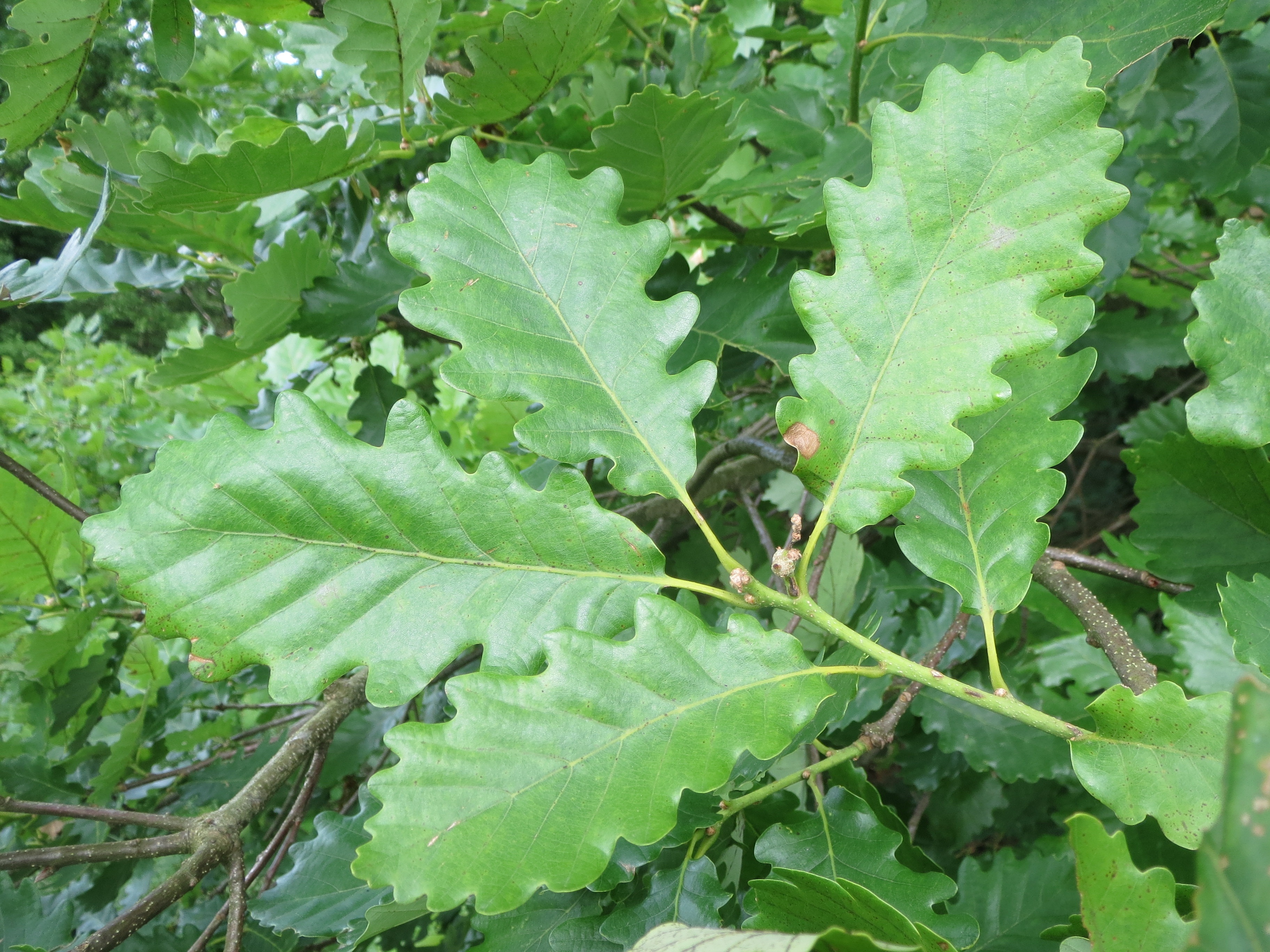 Traubeneiche (Quercus petraea) im Schwetzinger Hardt